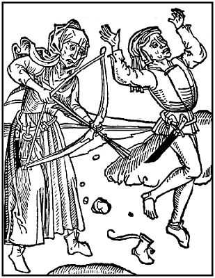 Darstellung eines "Hexenschusses" auf einem Druck von Johann Zainer um das Jahr 1489/90, Holzschnitt aus dem tractatus von den bösen weibern, die man hexen nennt von Ulrich Molitor